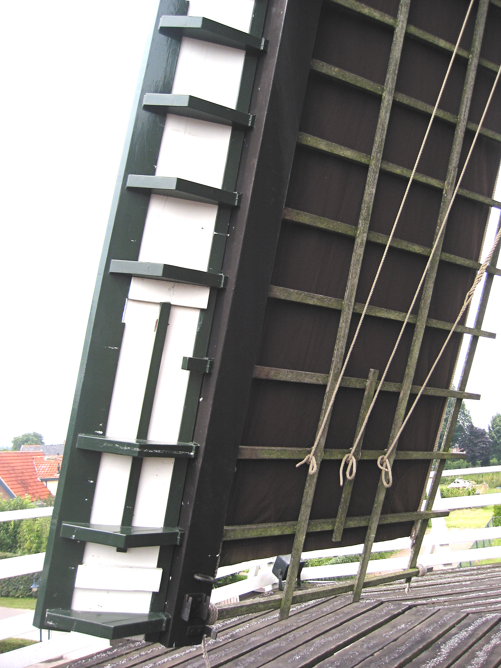 Achterkant molenwiek